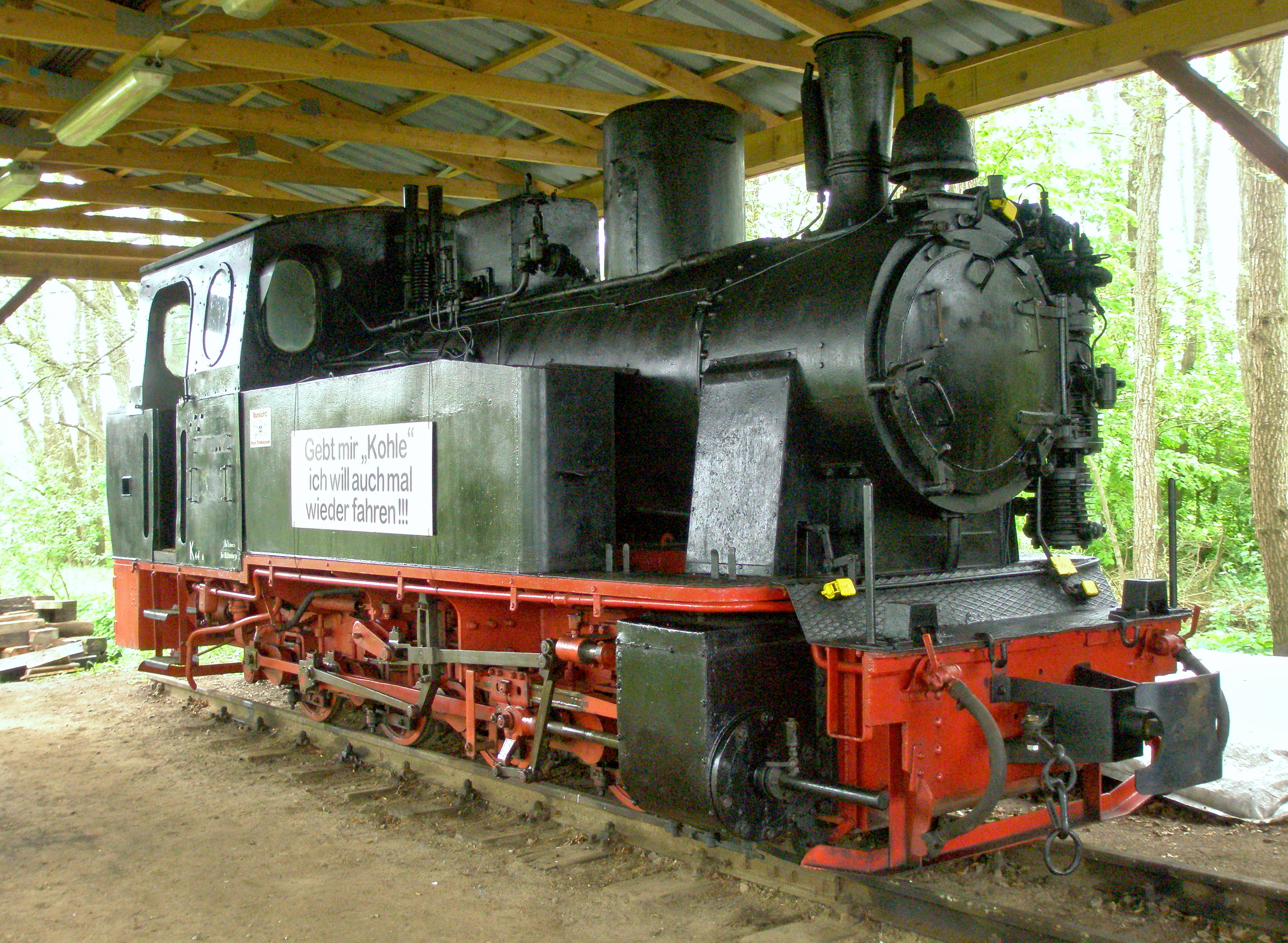 Dampflokomotive 99 4644 im Bahnhof Mesendorf.